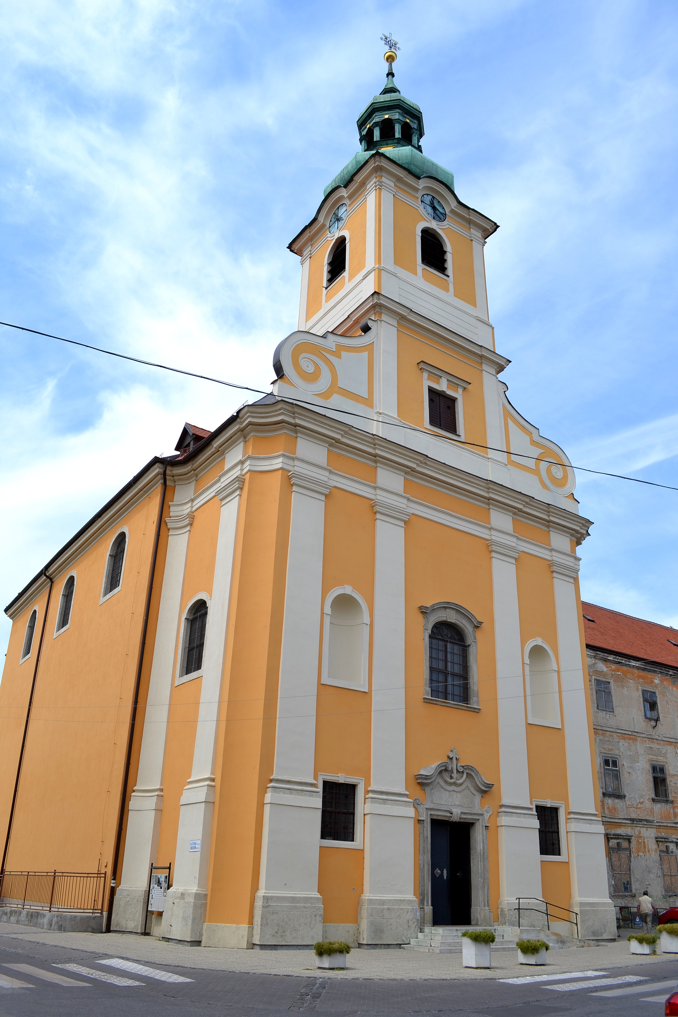 Kostol Nanebovzatia Panny Márie v Šamoríne; celkový pohľad Object location48° 01′ 42.24″ N, 17° 18′ 25.92″ E